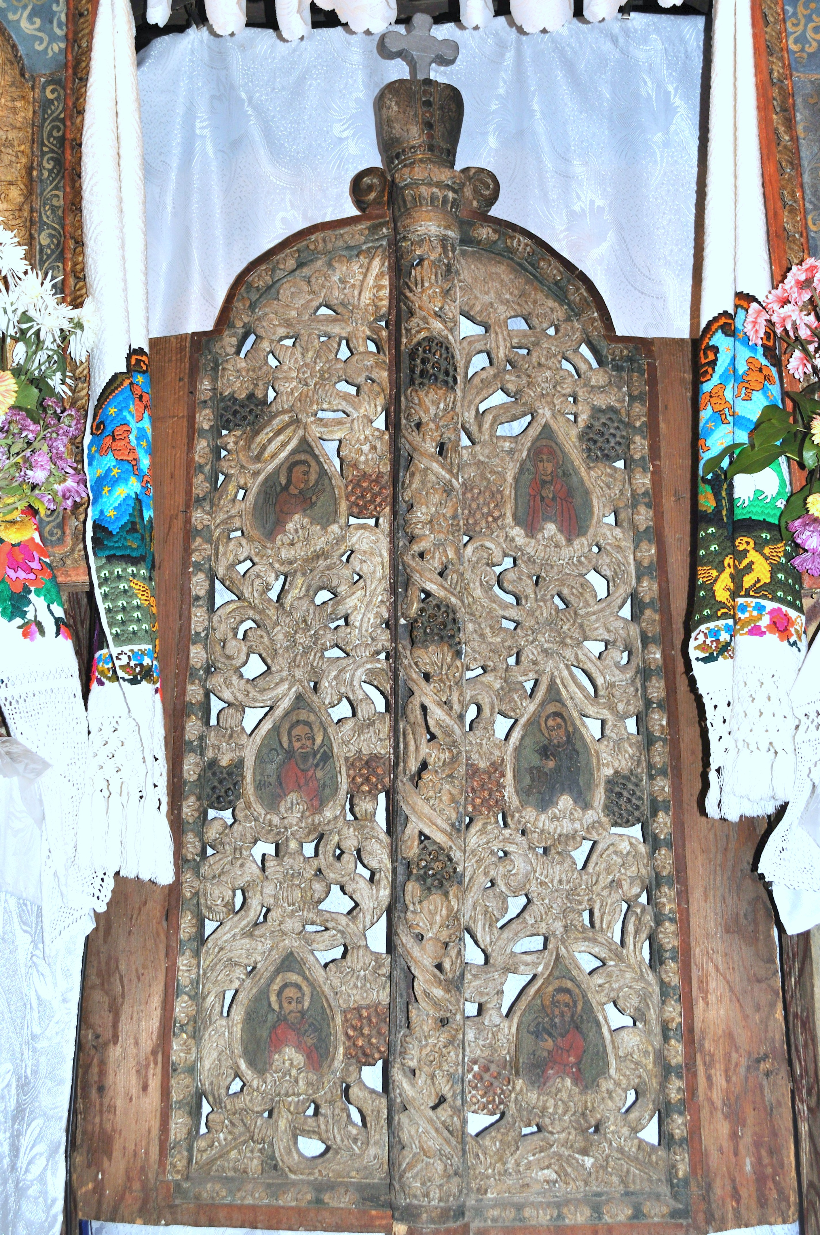 Biserica de lemn „Cuvioasa Paraschiva" din Desești, județul Maramureș